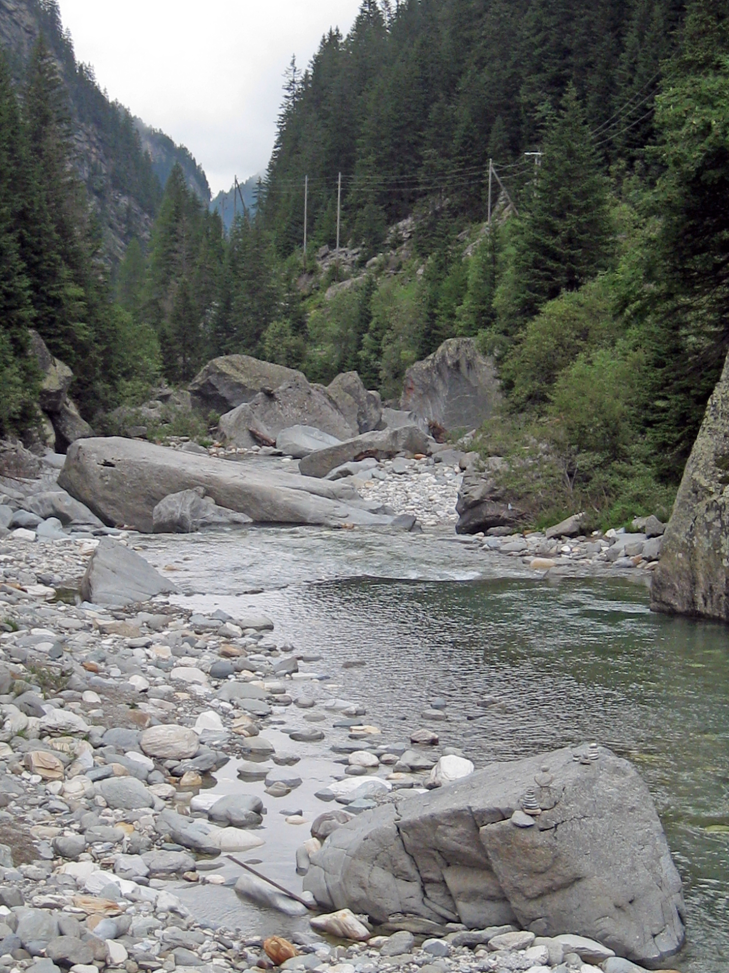 Steg über Averser Rhein, Plan Davains, Ausserferrera, Schweiz, Blickrichtung Nord